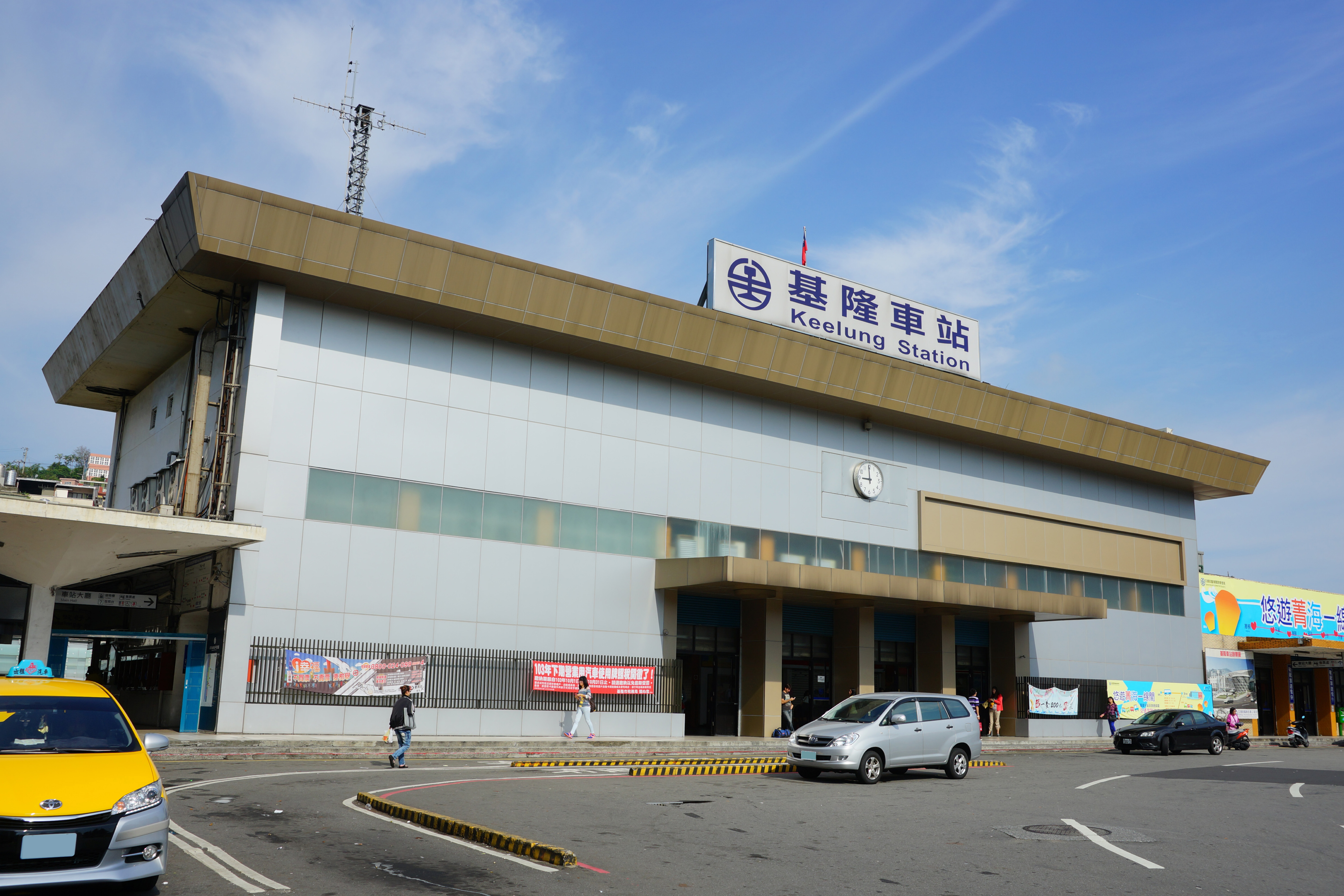 臺灣鐵路管理局第四代基隆車站，由於外觀破舊，以裝飾板覆蓋站體。